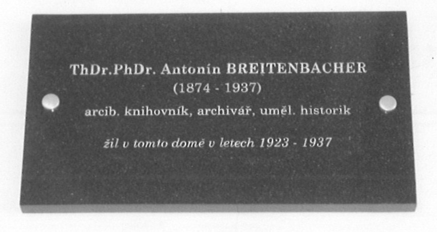 Regentský dům, Velké náměstí 39/23/Pilařova, Kroměříž.